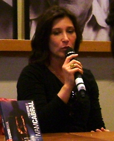 Beth Goulart, atriz brasileira, durante a Balada Literária, na Livraria da Vila, em São Paulo.